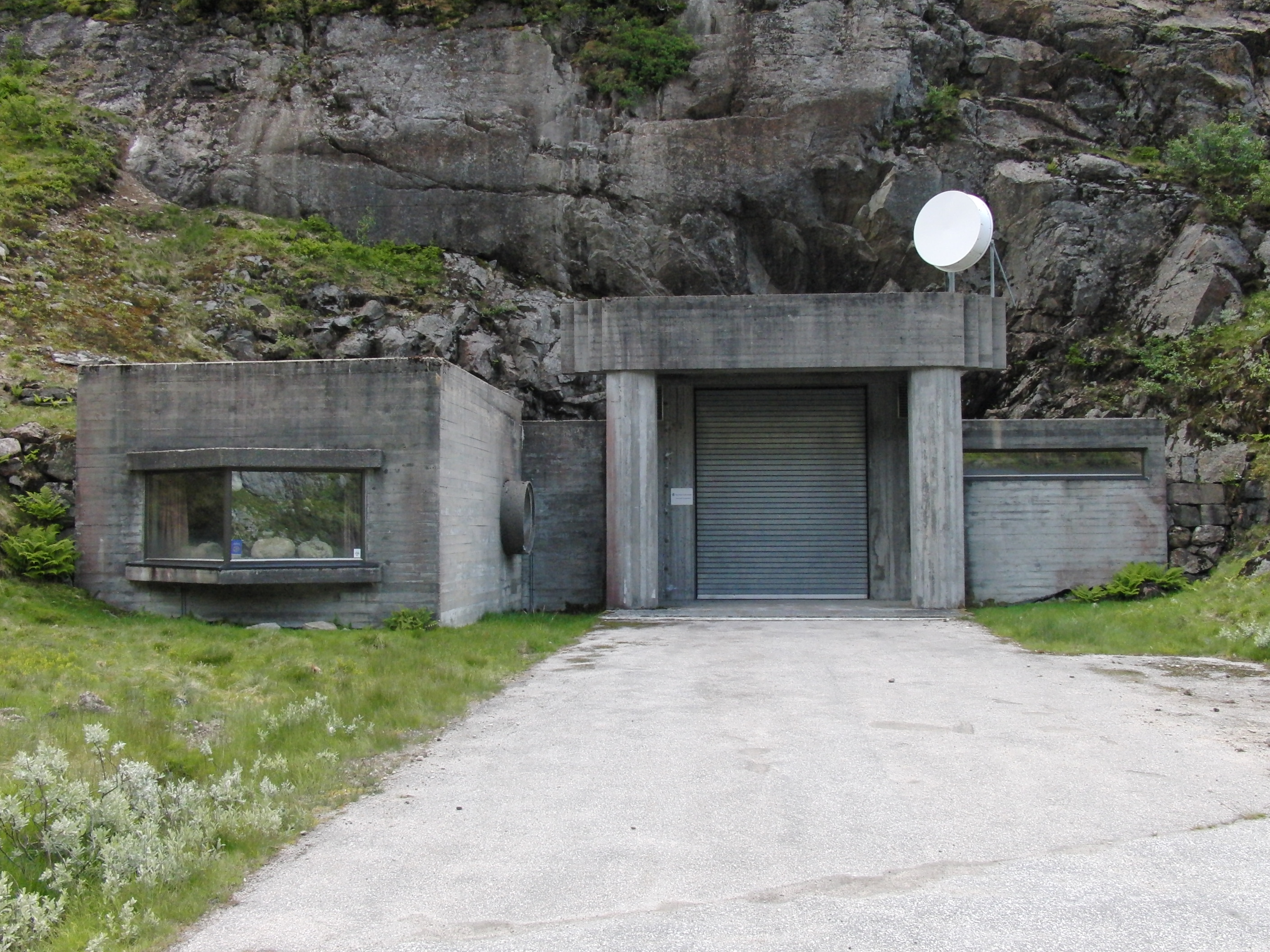 Hunnevatn pumpestasjon